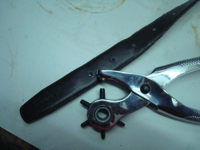 poinçonneuse à main (perçage du cuir)